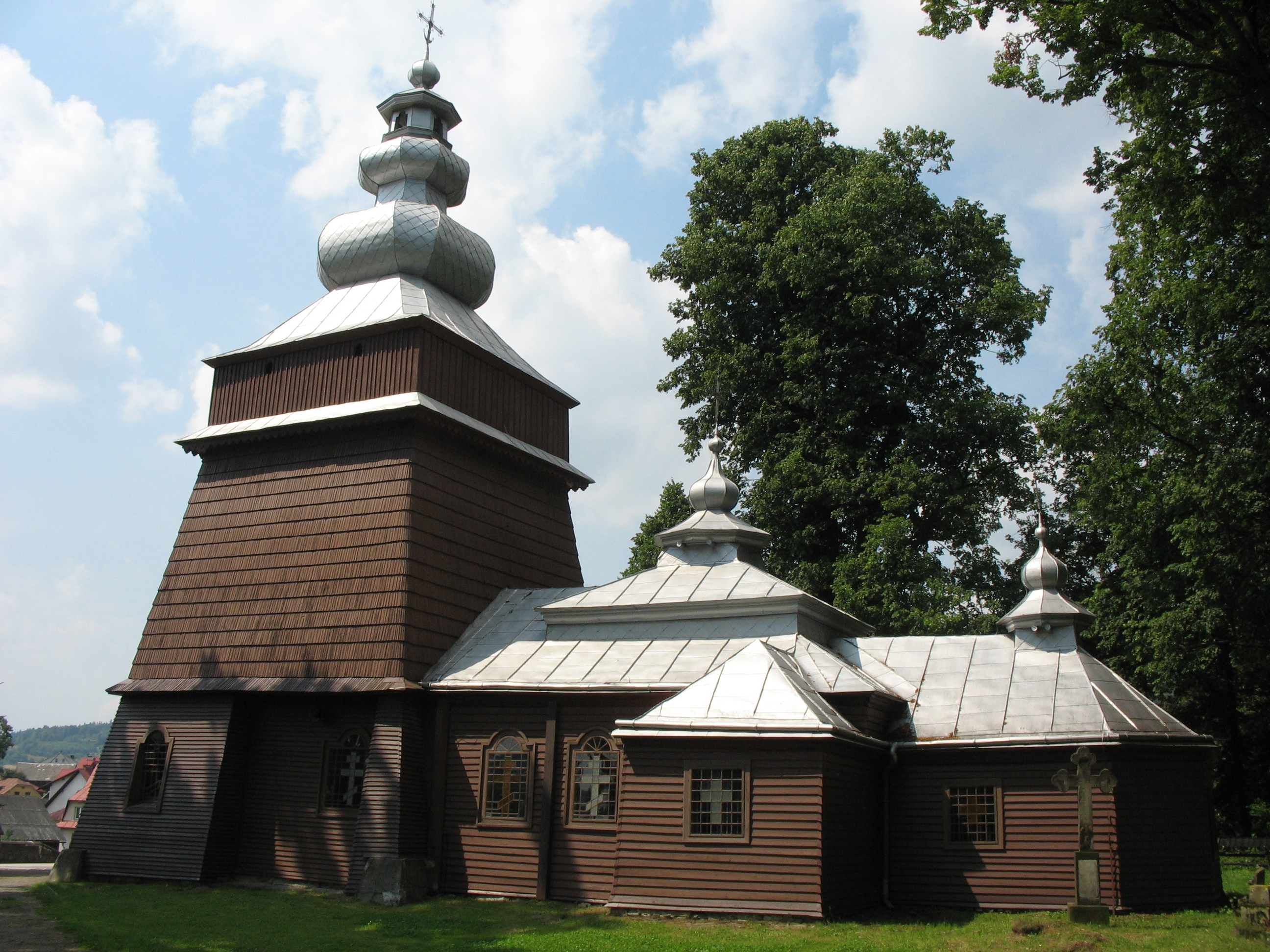 Dawna cerkiew greckokatolicka w Tyliczu (obecnie kościół rzymskokatolicki)